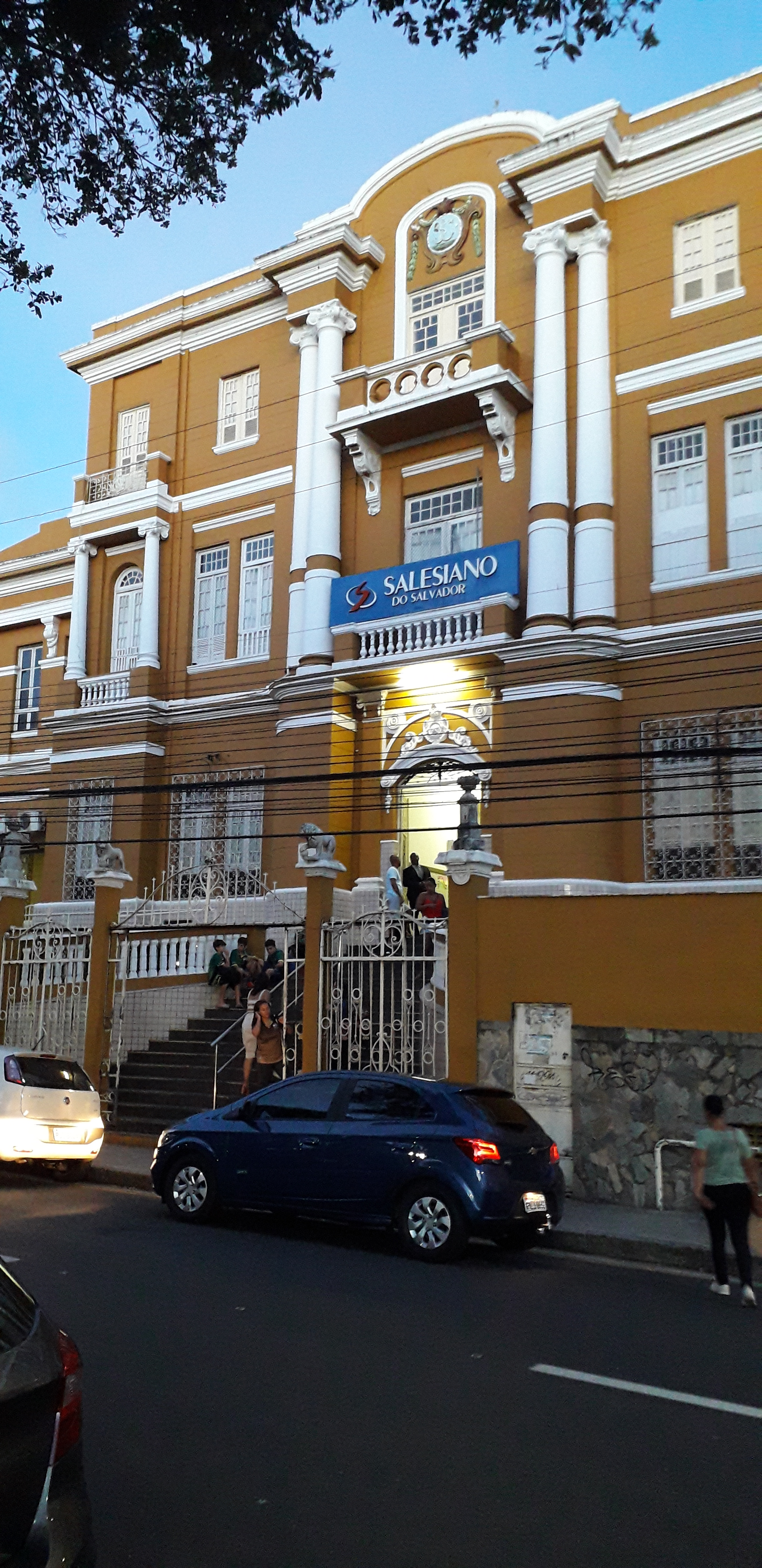 Vista externa do Liceu Salesiano de Salvador, localizado no bairro de Nazaré, Salvador, Bahia